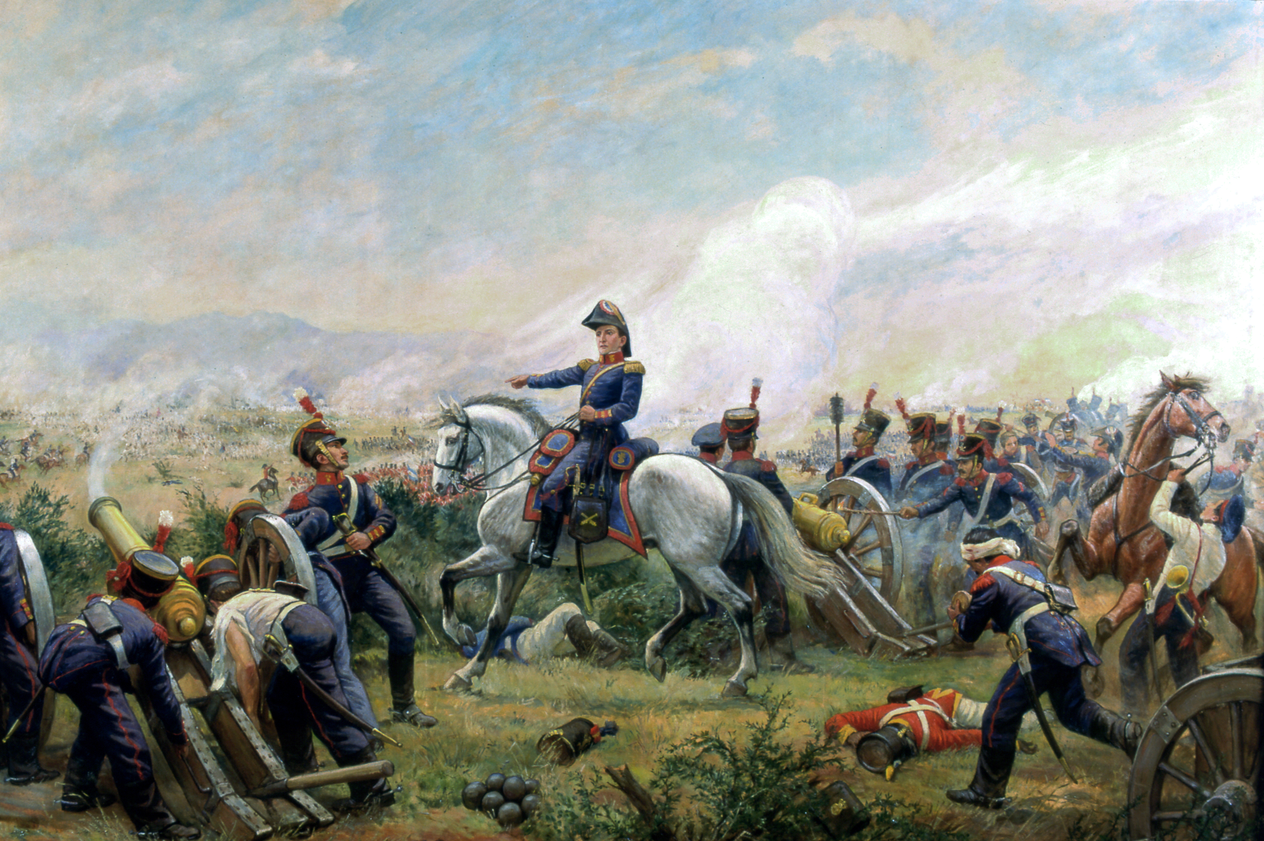 Detalle Los Artilleros de Borgoño en la batalla de Maipú